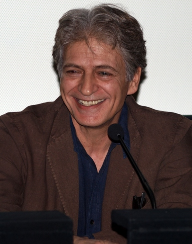 Фабріціо Бентівольо. Фото G. M. Ireneo Alessi (Sinix)